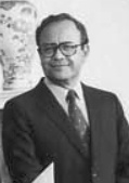 Arturo Cruz